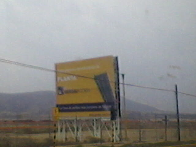 Anuncio de Construcción de una planta de Gerdau Corsa